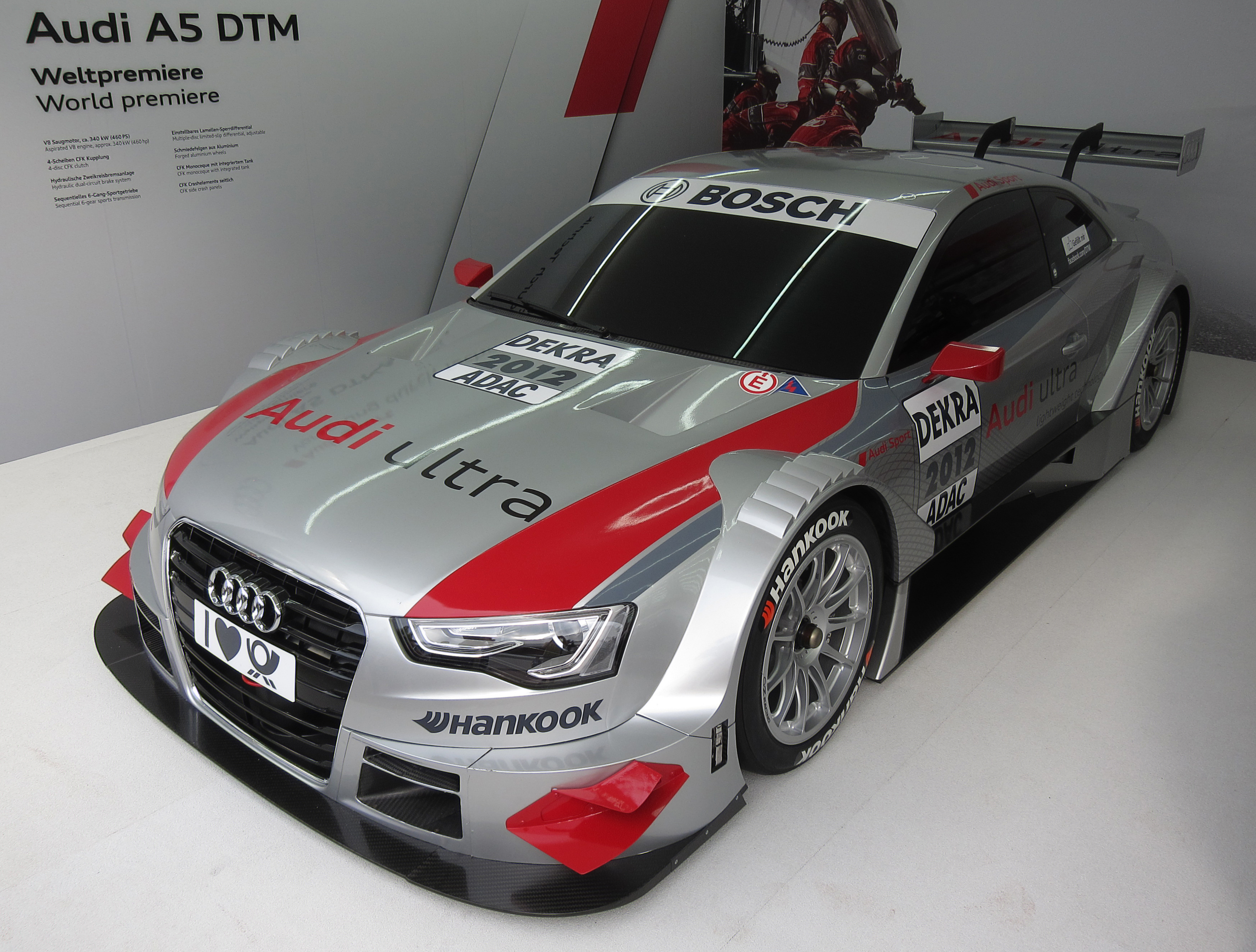 Audi A5 DTM auf der Internationalen Automobil-Ausstellung in Frankfurt/Main.